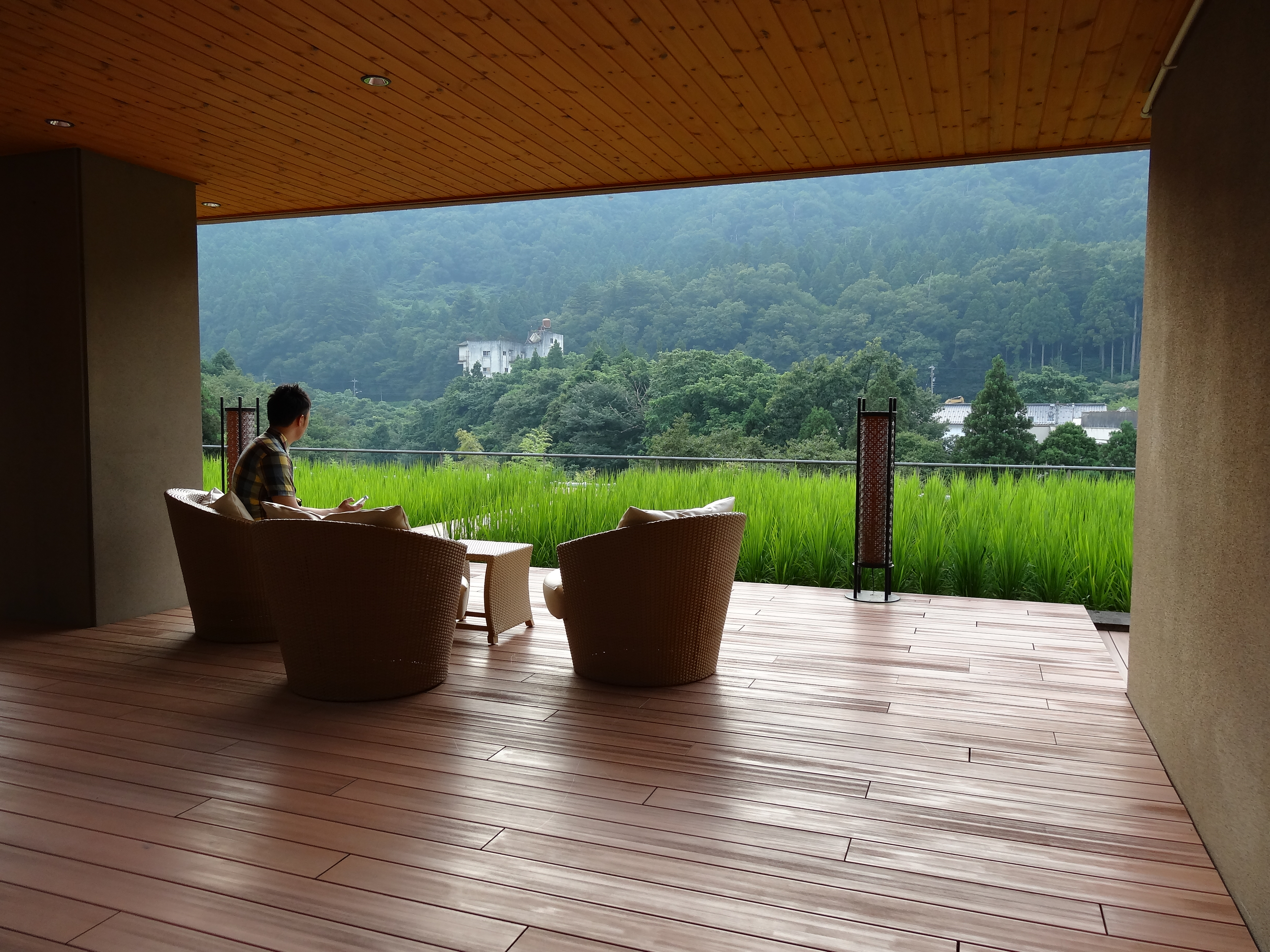 宿泊客に鑑賞されることを念頭に、計算されて作られた水田 秋に収穫した米は客に振舞われる。 （「厨八十八」石川県加賀市山中温泉 2012年7月撮影）